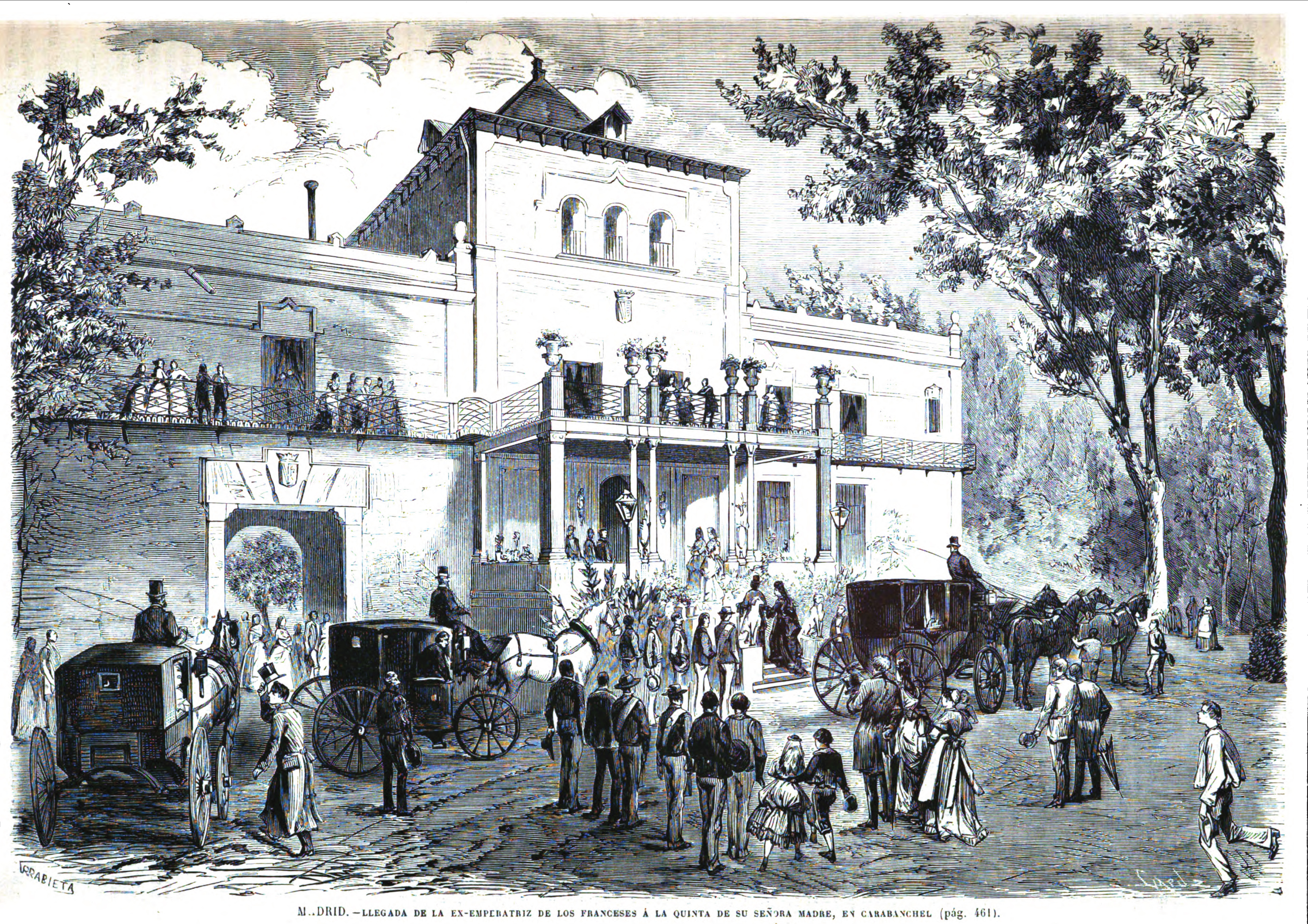 Madrid.—Llegada de la ex-emperatriz de los franceses á la quinta de su señora madre, en Carabanchel.